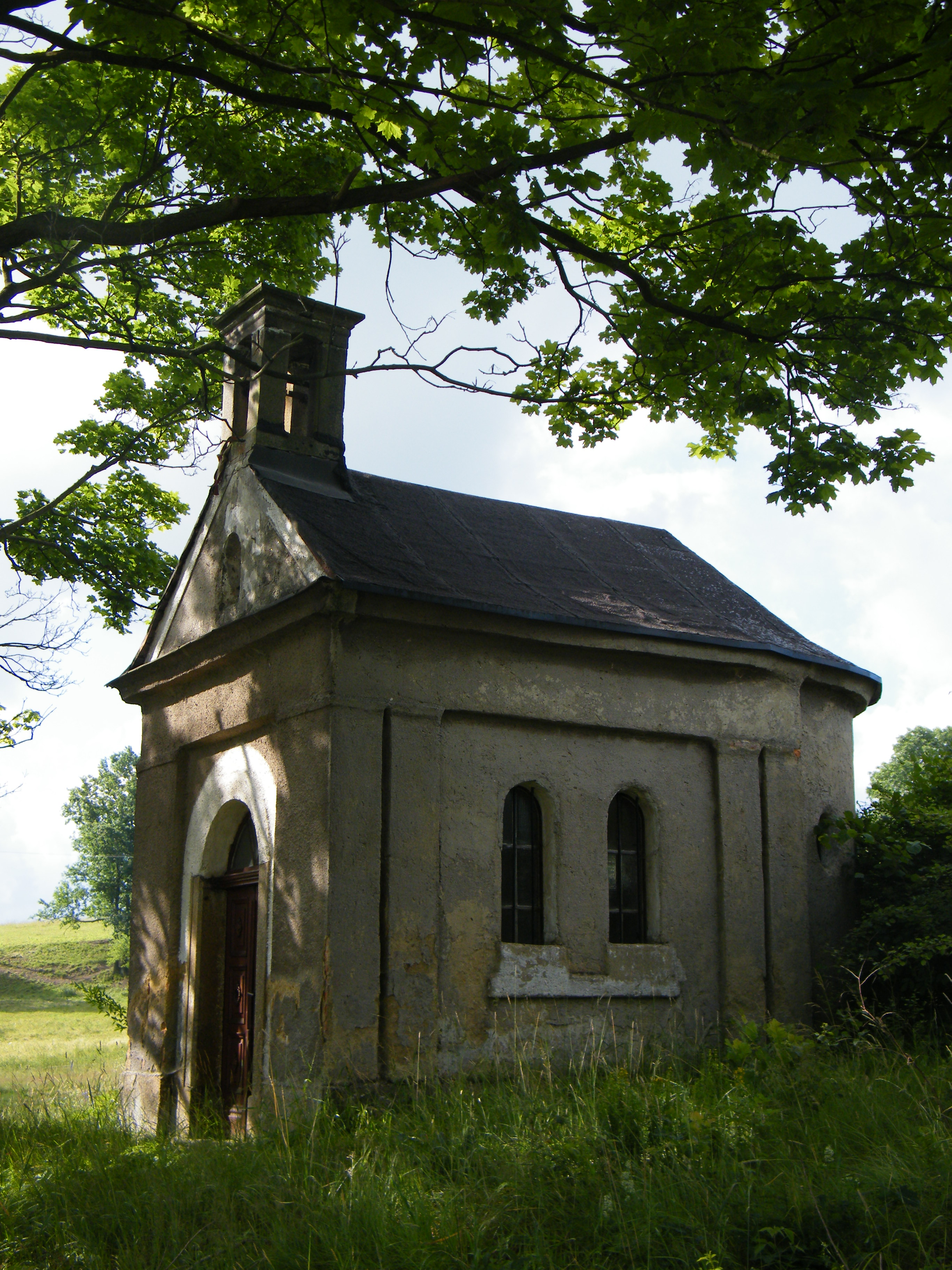 Kaple Nanebevzetí Panny Marie v Novém Hraběcí u Šluknova